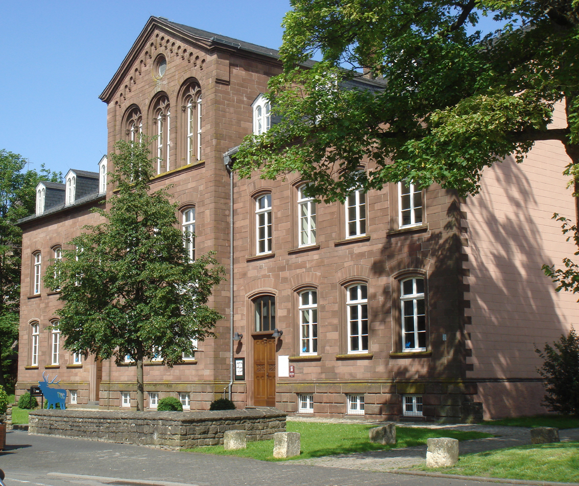 Außenansicht des Kreismuseums Bitburg-Prüm in der Triererstraße, Bitburg.